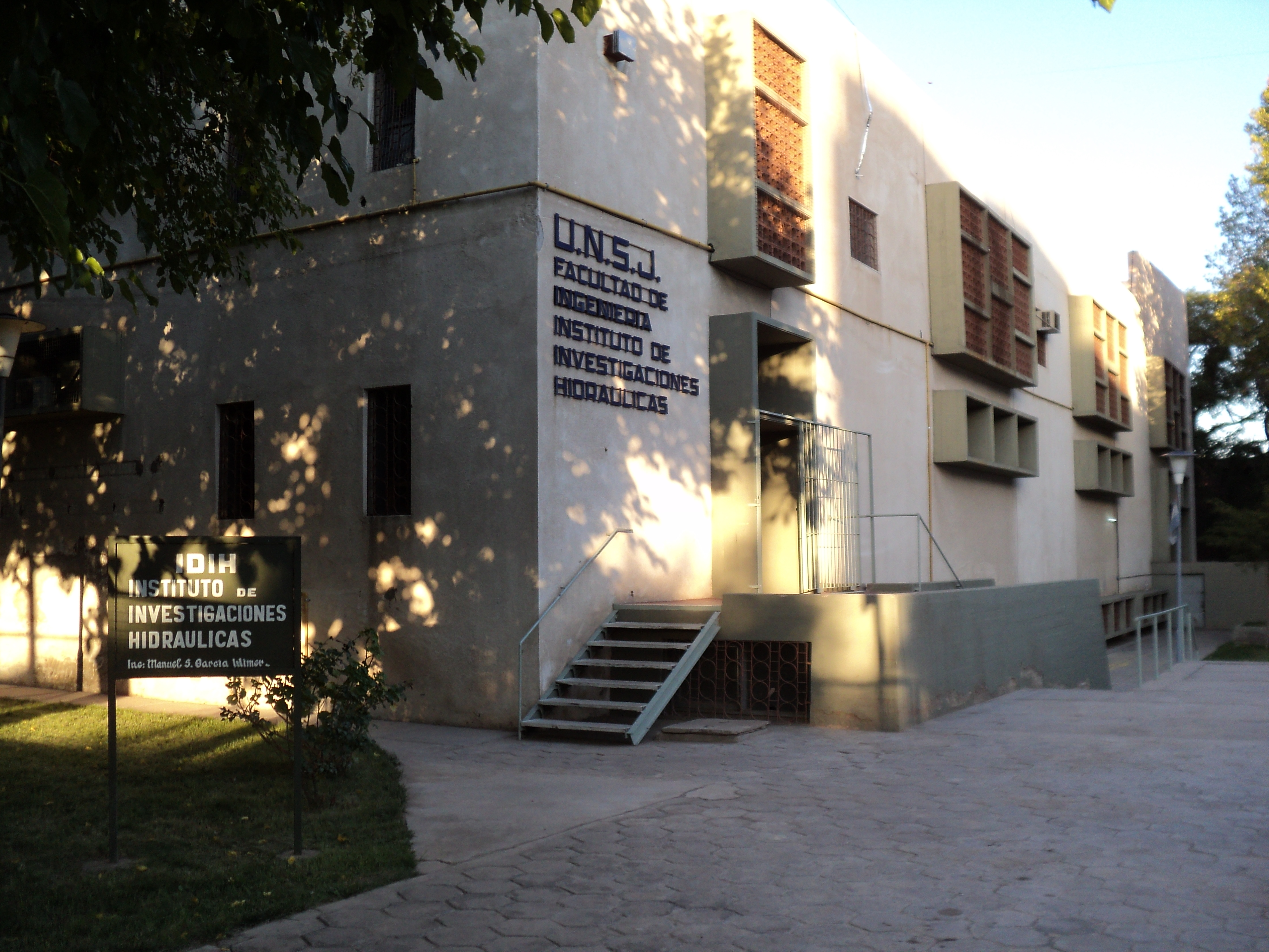 INTITUTO DE INVESTIGACIONES HIDRAULICAS